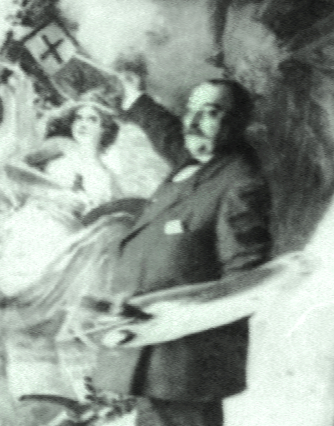 Eugenio Oliva hacia 1912, pintando el techo de la Diputación de Palencia.